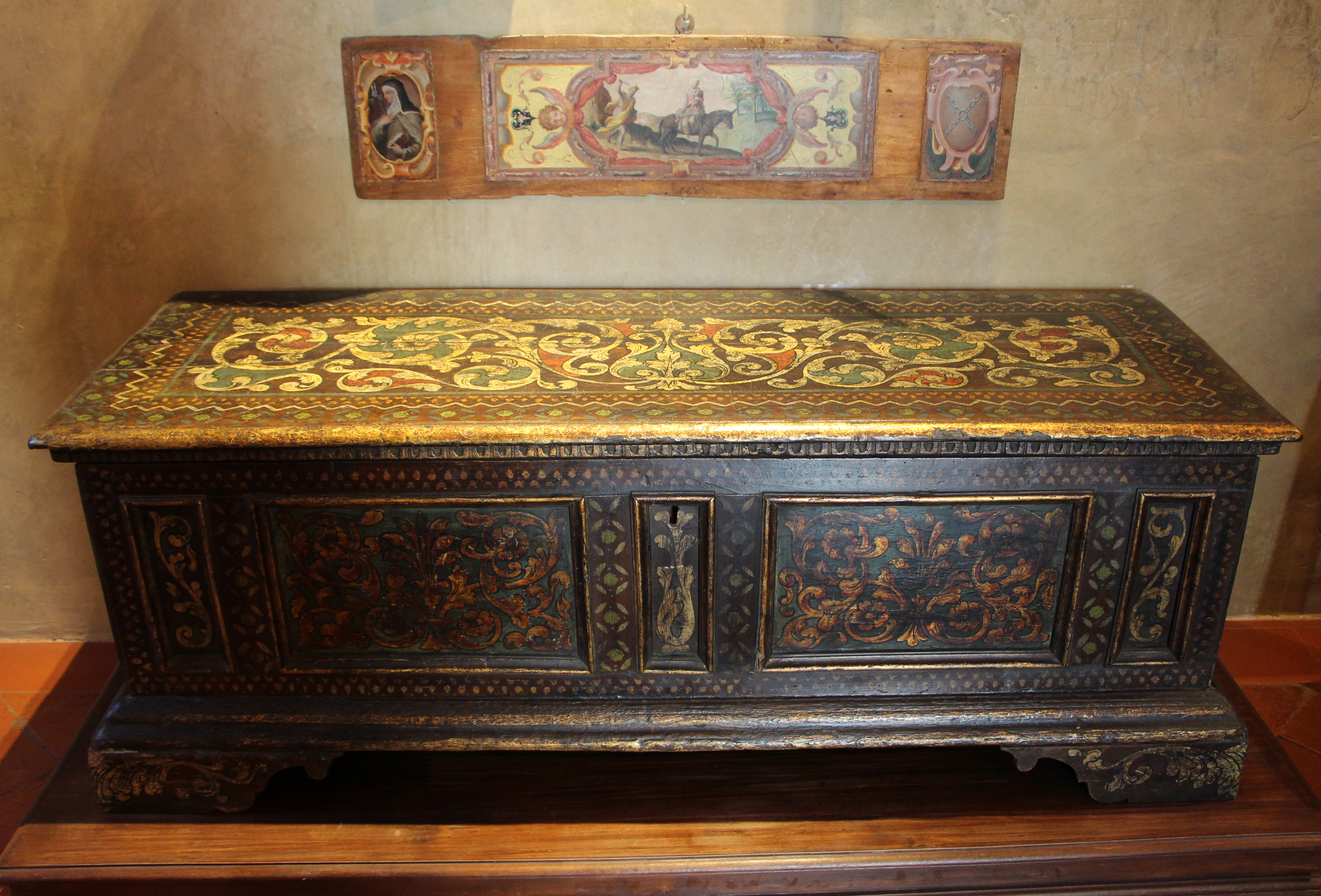 Museo della Casa fiorentina Antica - Palazzo Davanzati - MIBAC The making of this document was supported by Wikimedia CH. (Submit your project!) For all the files concerned, please see the category Supported by Wikimedia CH. This is a photo of a monument which is part of cultural heritage of Italy.